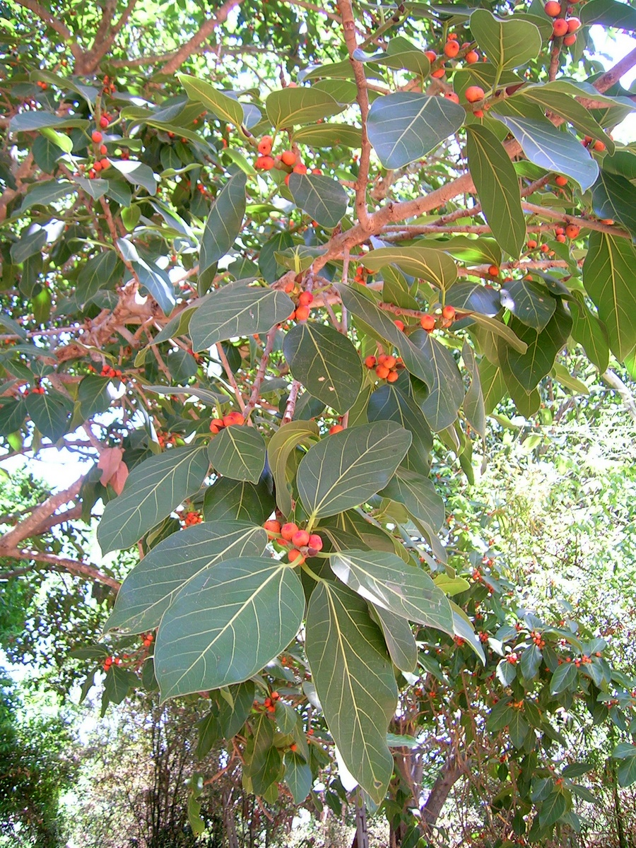 Ficus benghalensis from Karnataka India